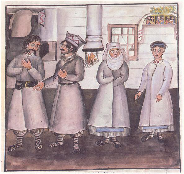 Одяг ХІХ ст. мешканців Тепелицького товариства